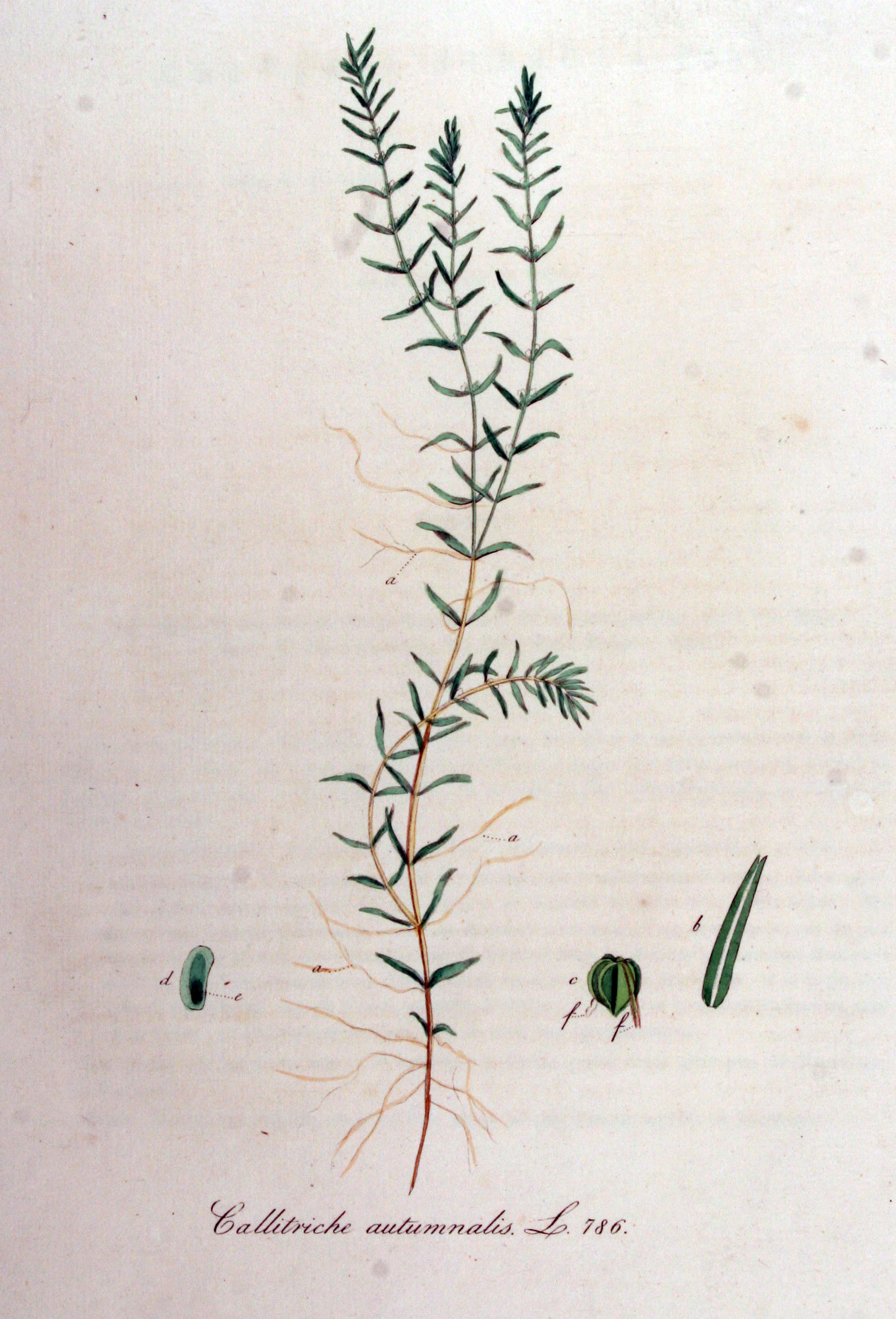 Callitriche hermaphroditica L. (Syn. Callitriche autumnalis L.)